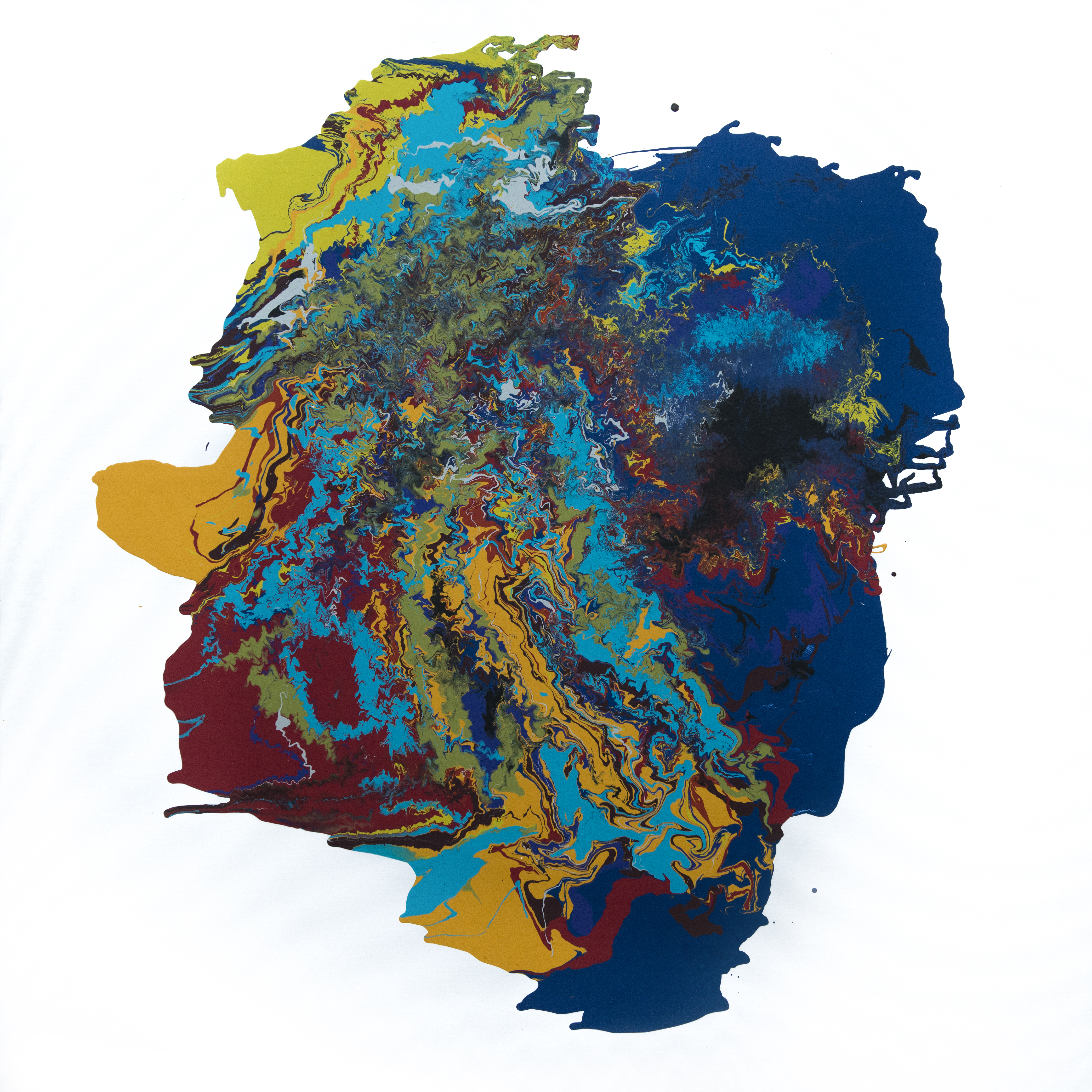 Srpskohrvatski / српскохрватски: Srce - Akril na platnu 120x120cm - Natalija Miladinović 2018.